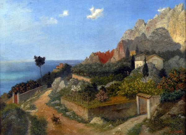 Italienische Landschaft- Landschaft mit blühenden Zitronen- und Orangenbäumen, links der Ausblick auf das weite Meer unter azurblauem Himmel